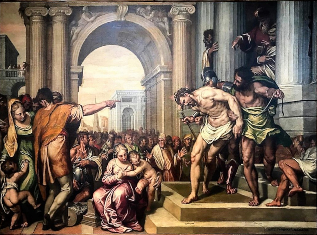 Cristo mostrato al popolo del pittore veronese Paolo Farinati